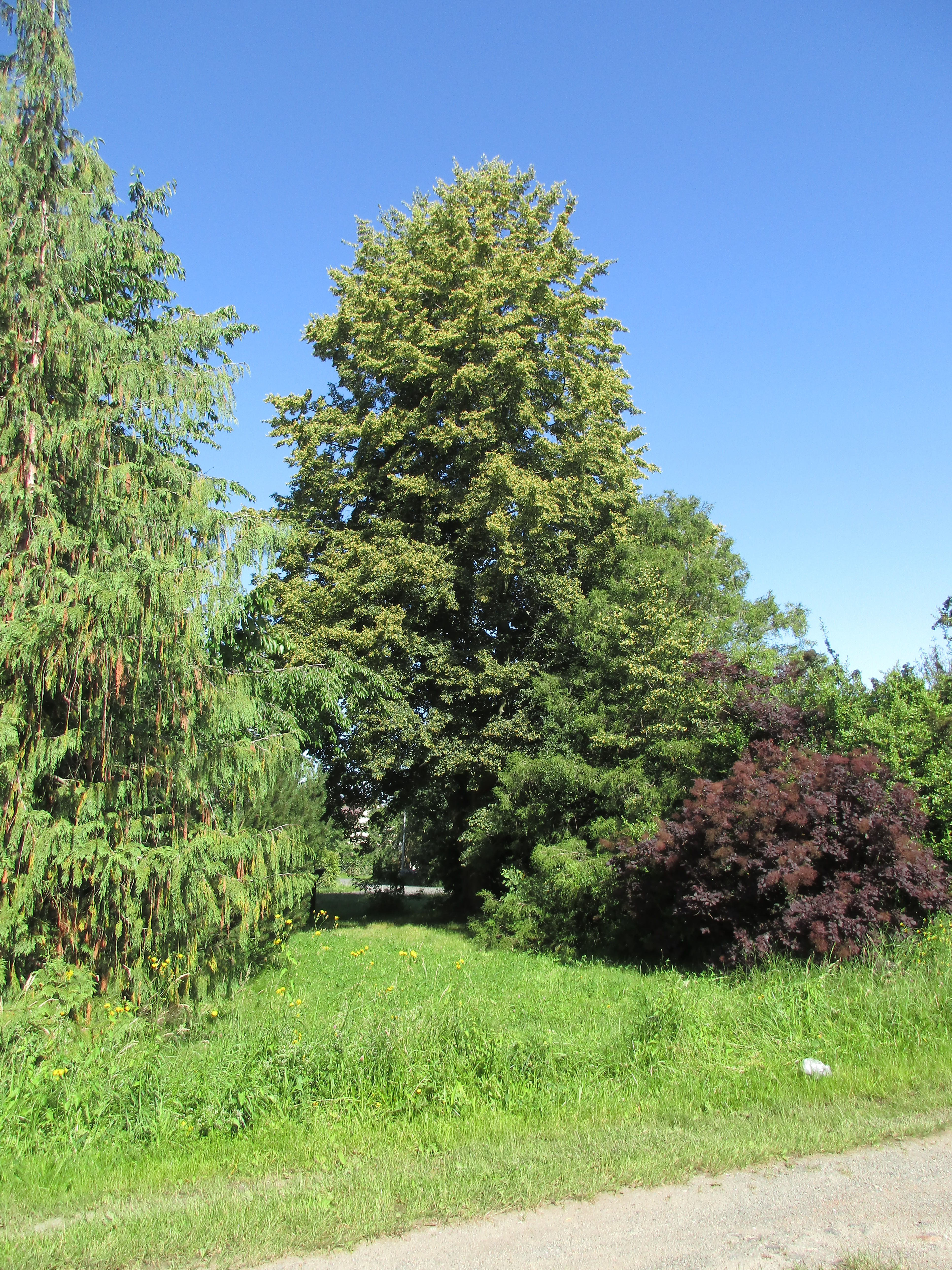 Lípa malolistá (Tilia cordata). Praha 9 - Újezd nad Lesy, Klešická. Vysazena 28. října 1968 na památku 50. výročí vzniku Československé republiky.